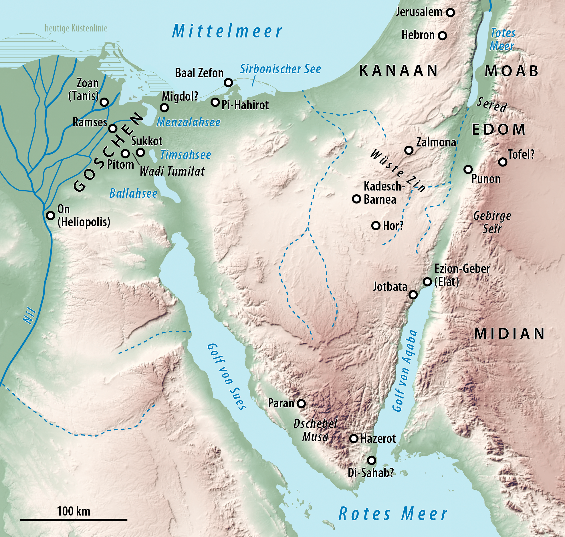 Karte des Sinai mit den Schauplätzen der Exodus-Erzählung